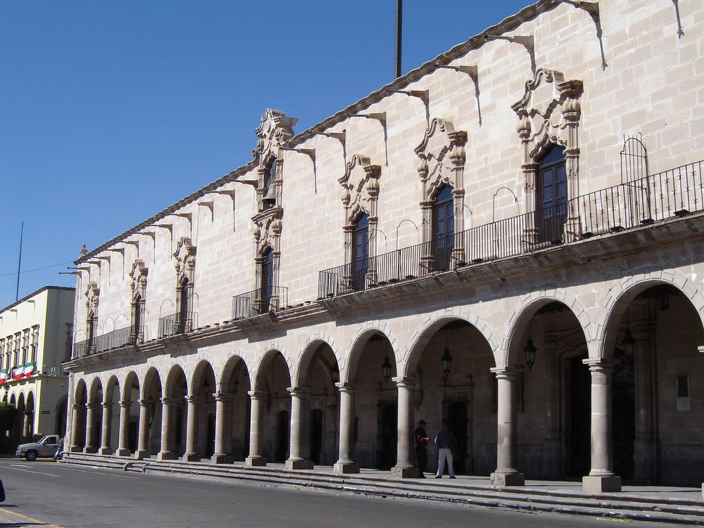 Fachada sur del palacio de Zambrano, ciudad de Durango, Mexico.